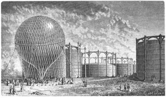 Remplissage d'un ballon à gaz à l'usine à gaz de la Villette (illustration publiée en 1870)